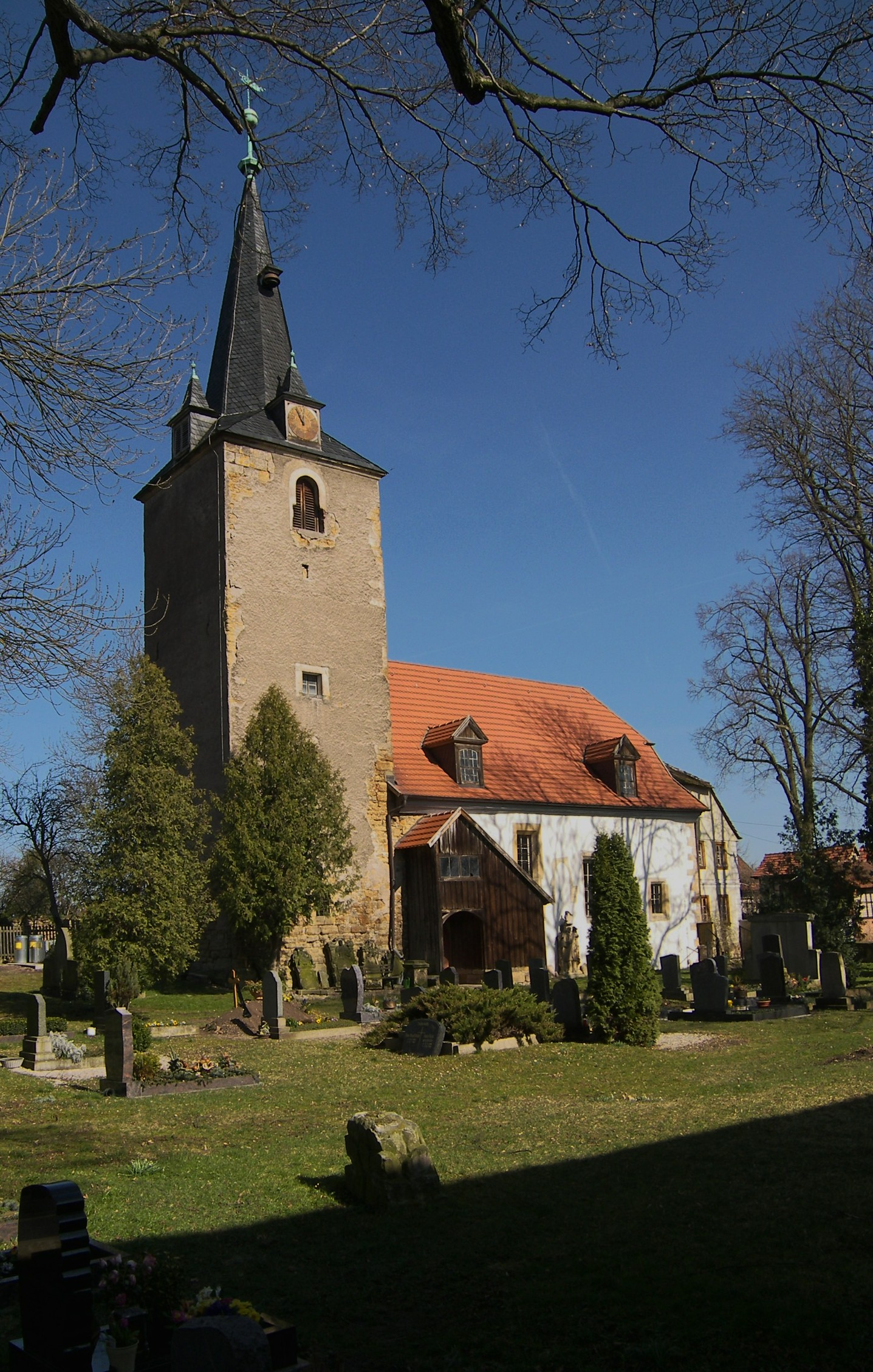 Thueringen-Grabsleben-Cobstaedt-Kirche